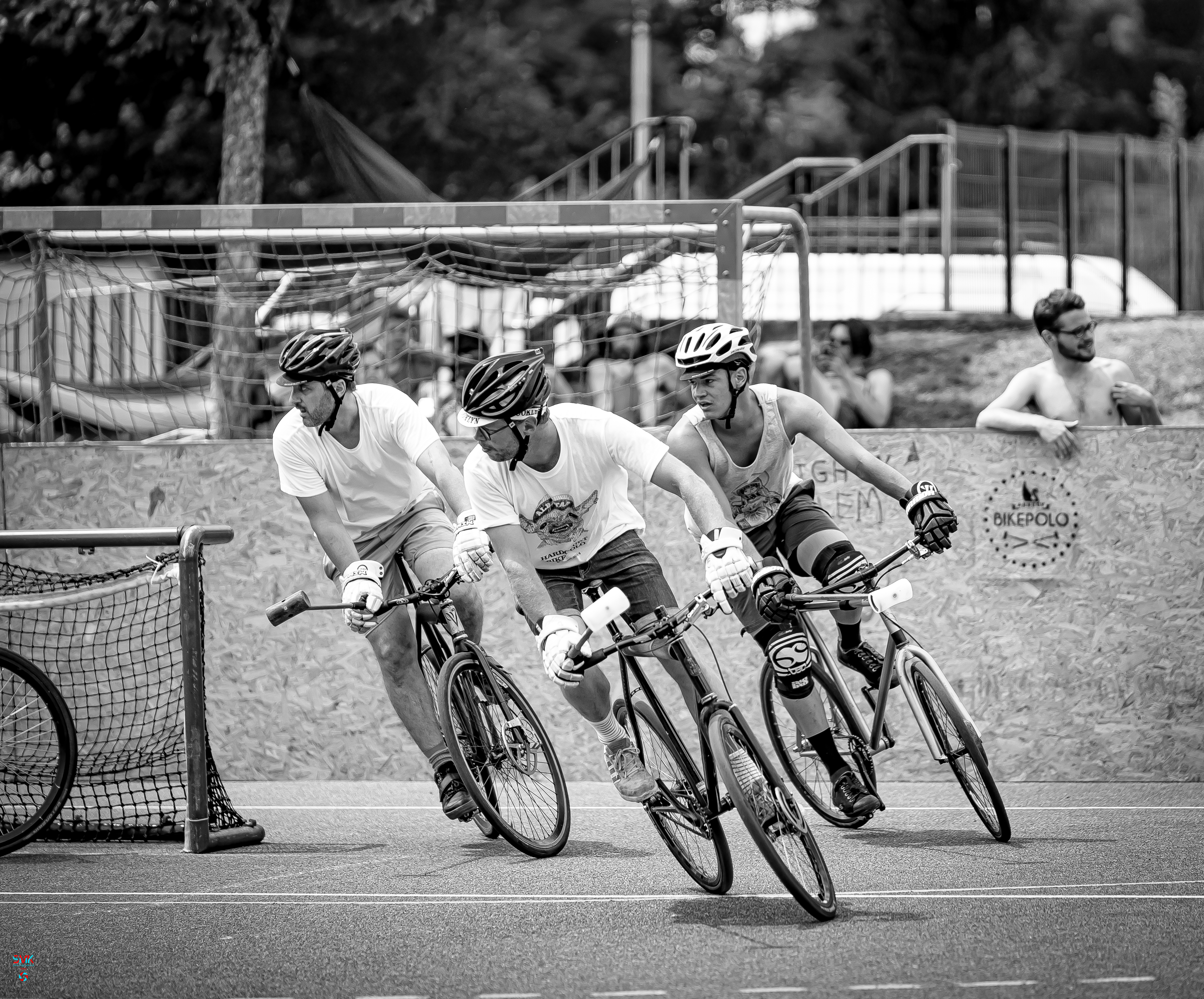 Hardcourt Bikepolo Annecy